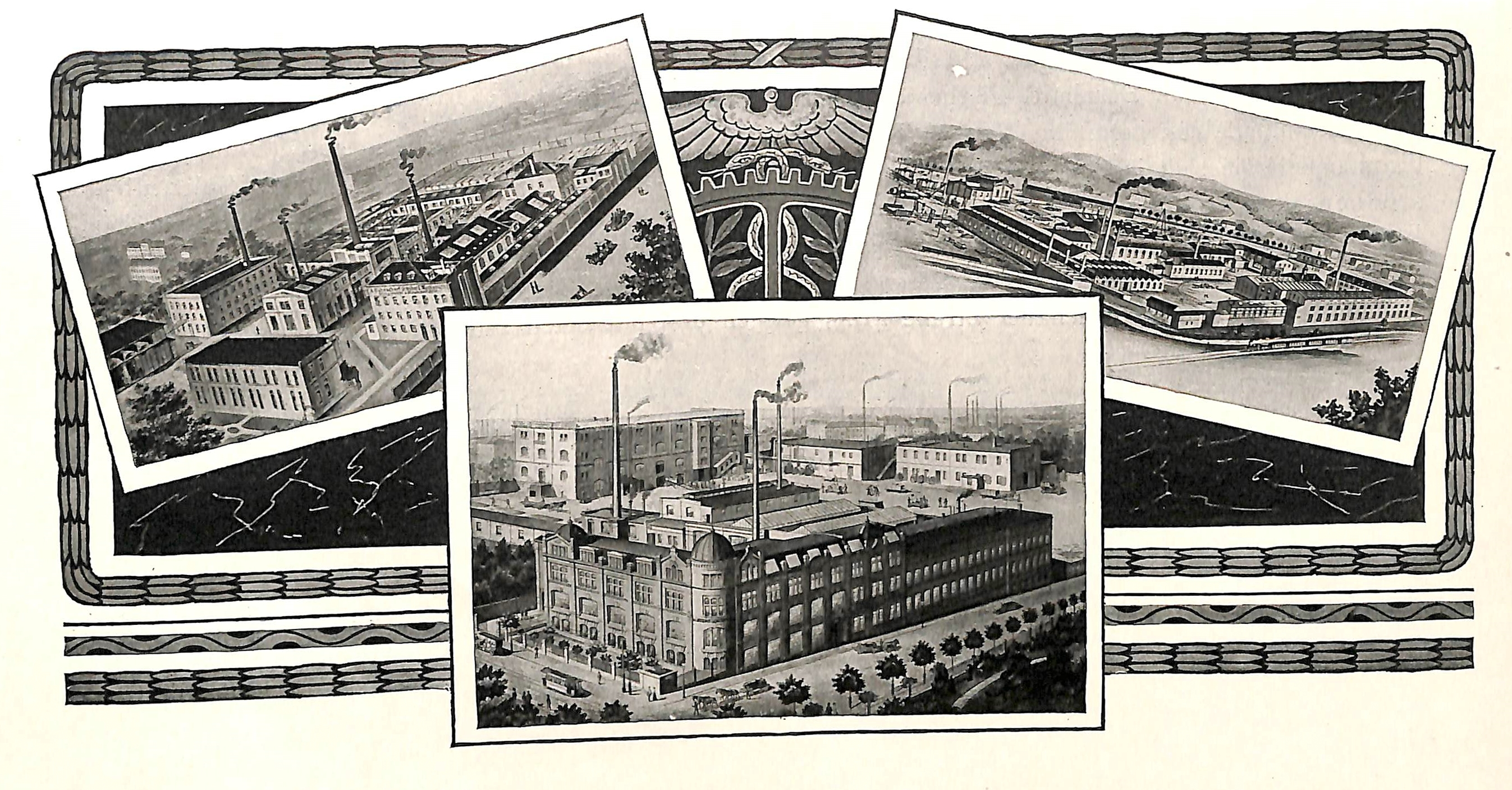 Dresden - verschiedene Gebäude der Gasmotorenfabrik Moritz Hille.